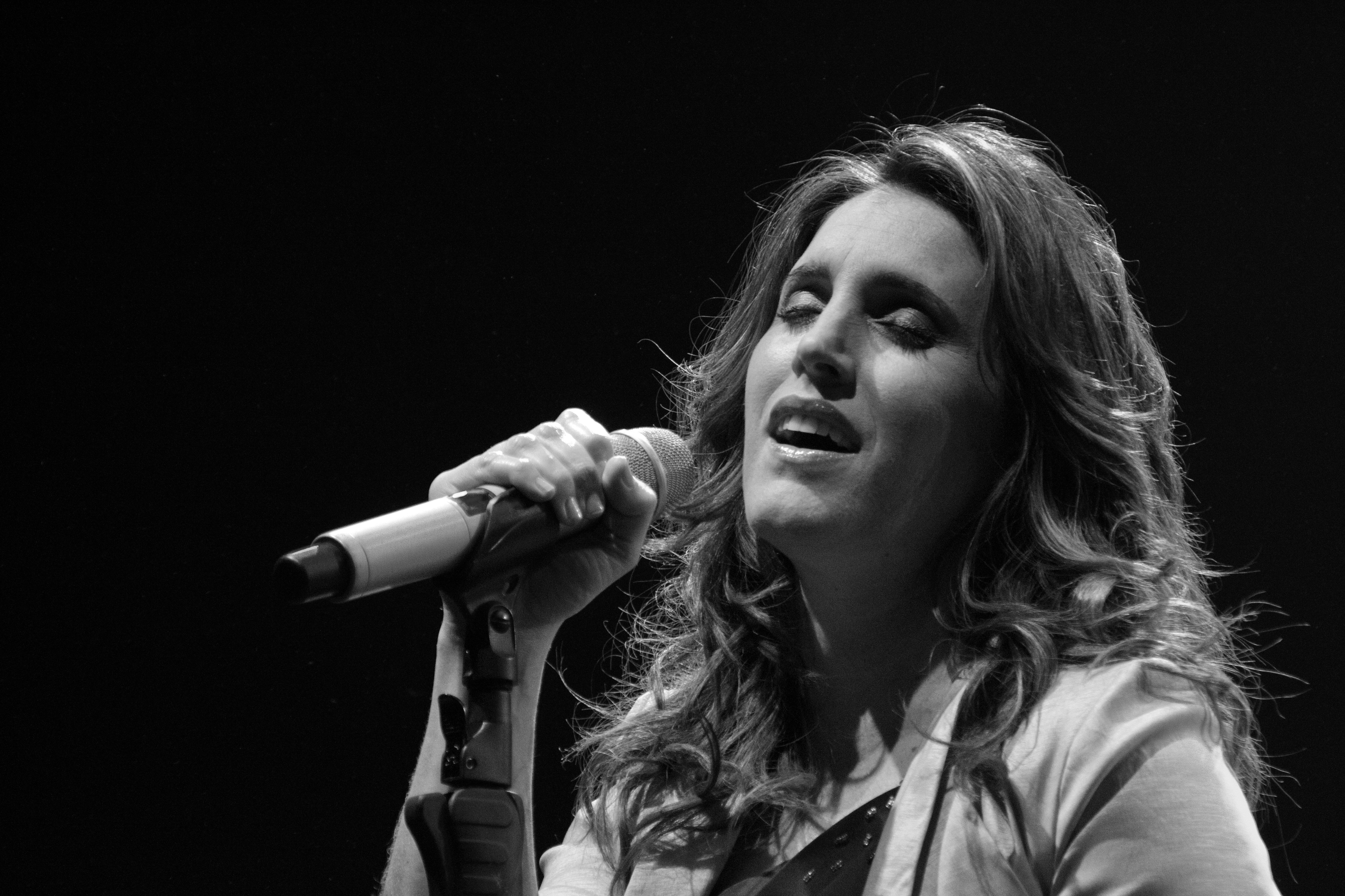 Soledad Pastorutti se presentó en Espacio Quality con "Canciones a la carta", Ciudad de Córdoba, Argentina.